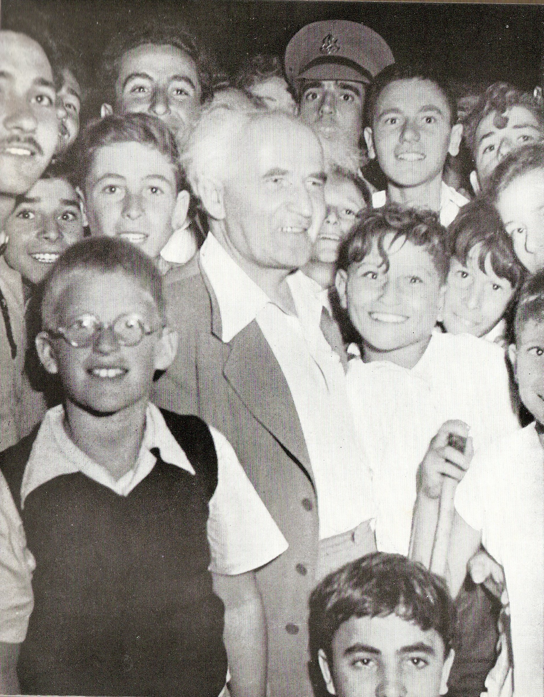 ראש הממשלה he:דוד בן-גוריון בכנס נוער. תחילת שנות החמישים.